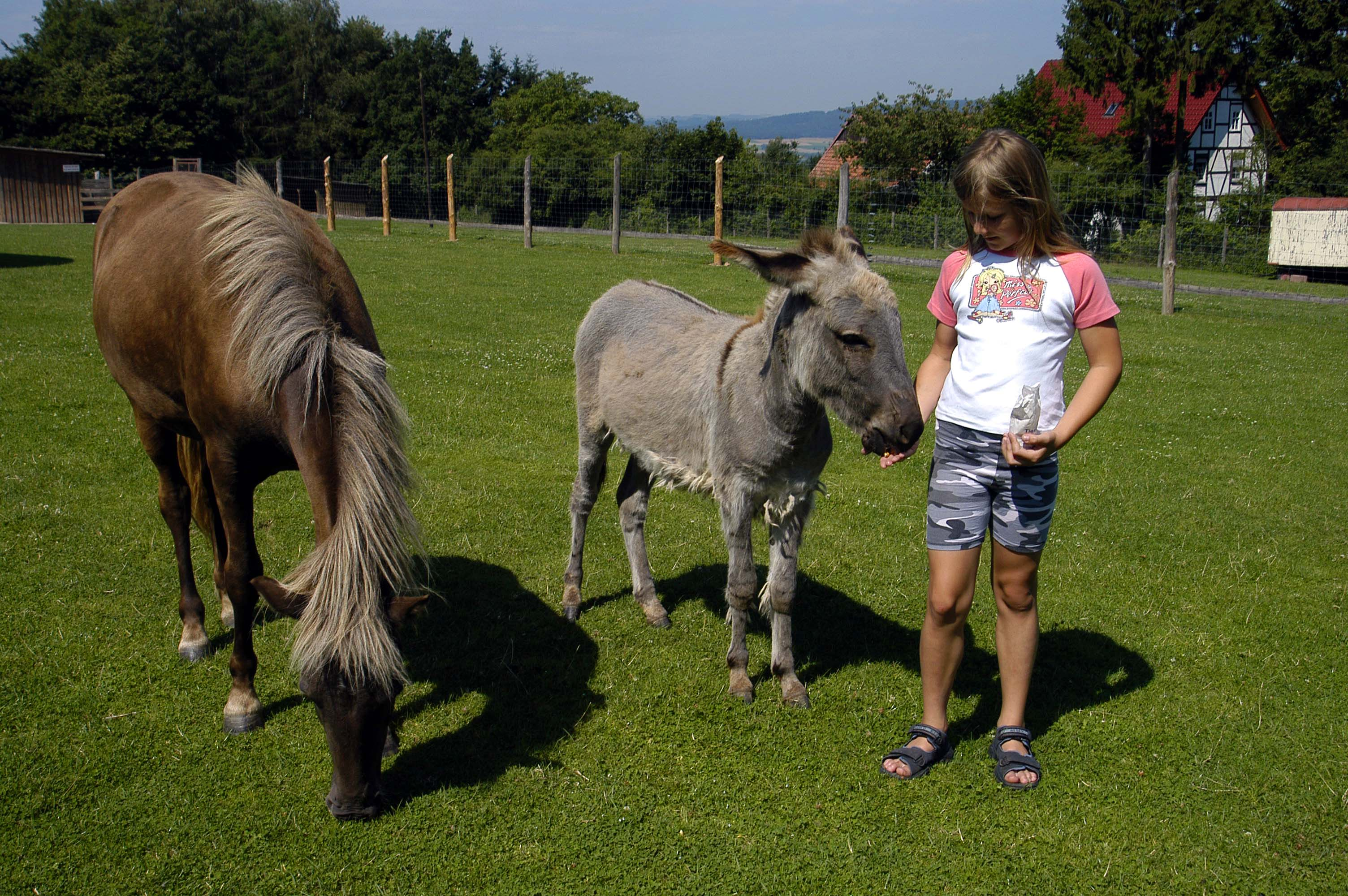 Streichelzoo